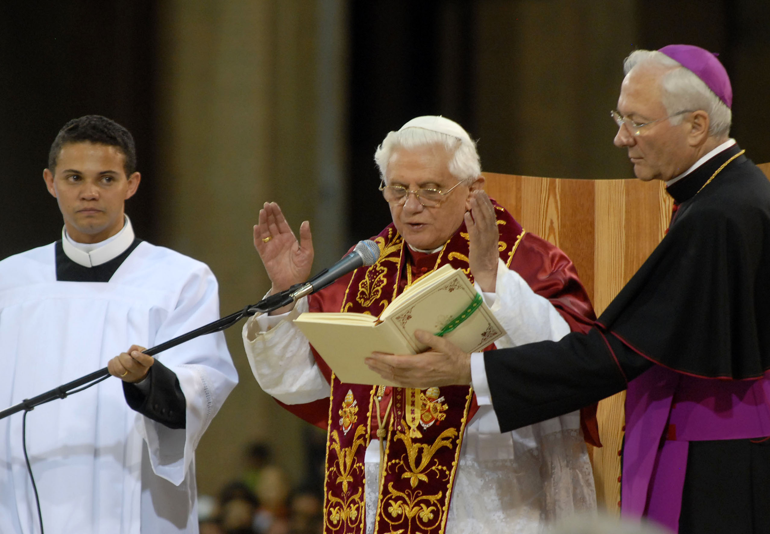 Papa Bento XVI durante cerimônia religiosa na Basílica de Nossa Senhora Aparecida, no interior do estado de São Paulo, Brasil.